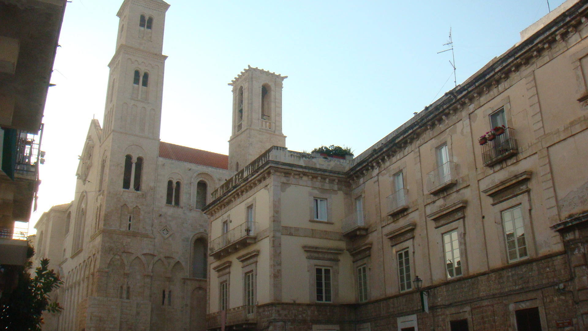 Giovinazzo: scorcio della Cattedrale di Giovinazzo e del Palazzo Ducale.